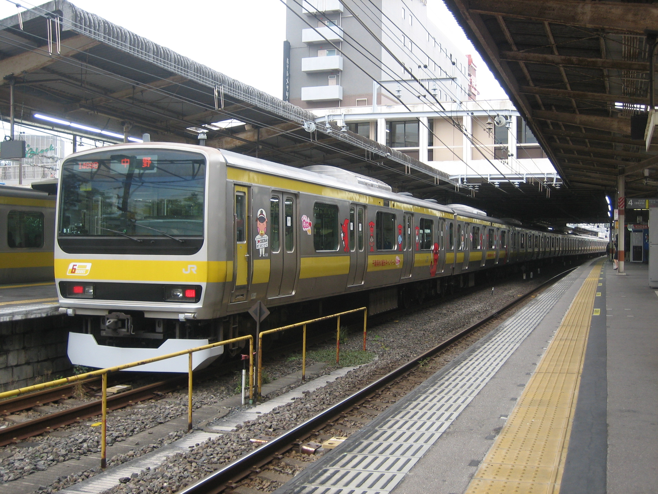 津田沼駅に停車中の中央・総武緩行線E231系0番台B1編成